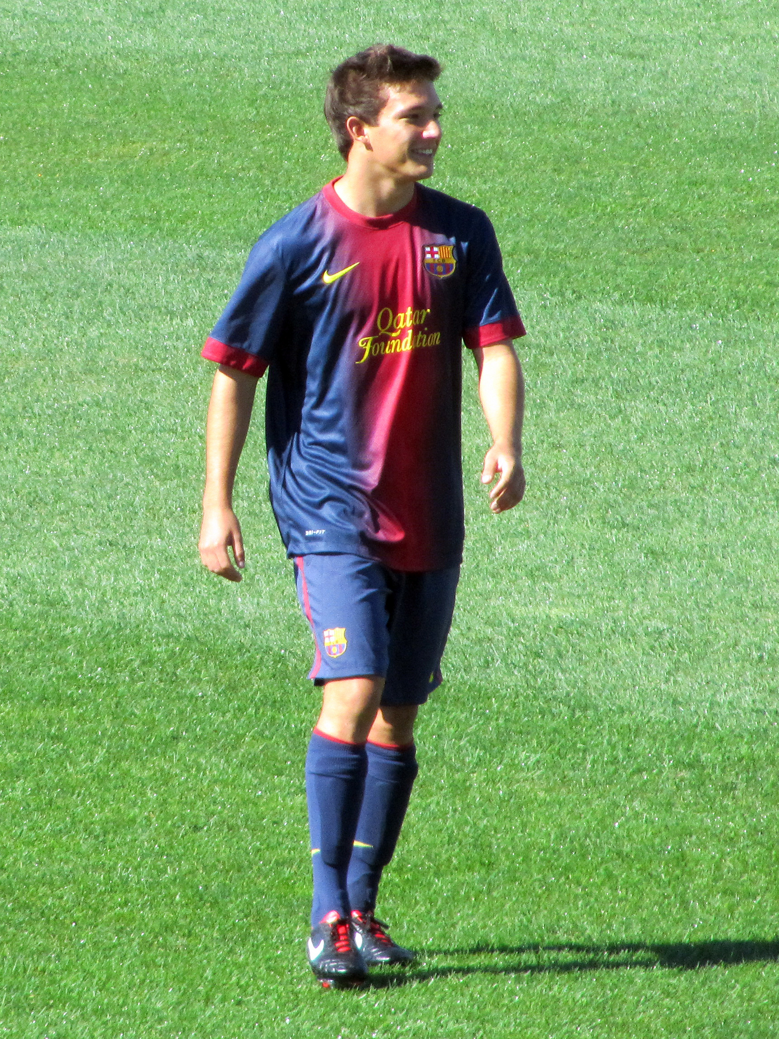 Foto realizada por Javier Segura (@castroquini)